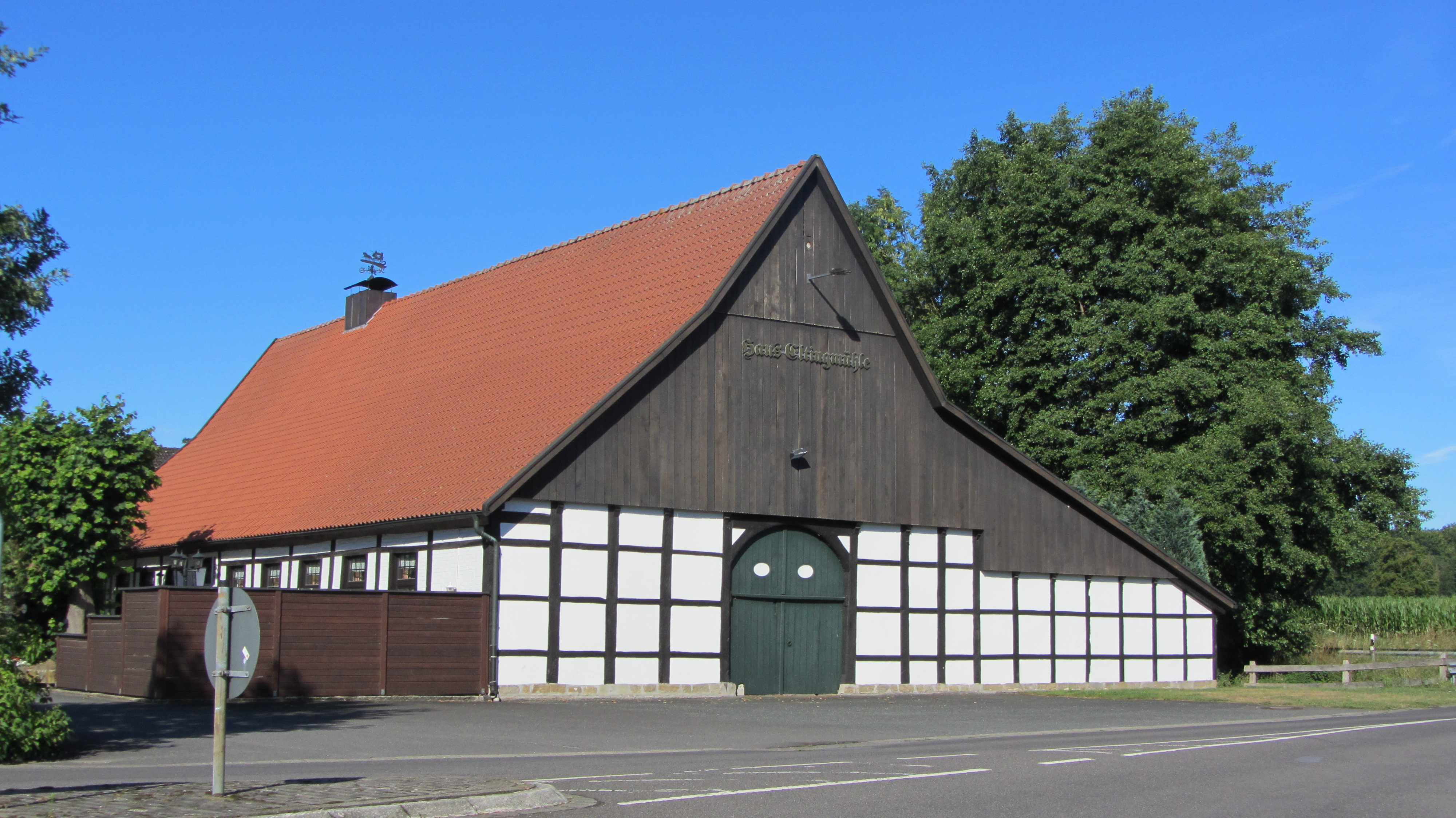 Haus Eltingmühle in Greven / Schmedehausen